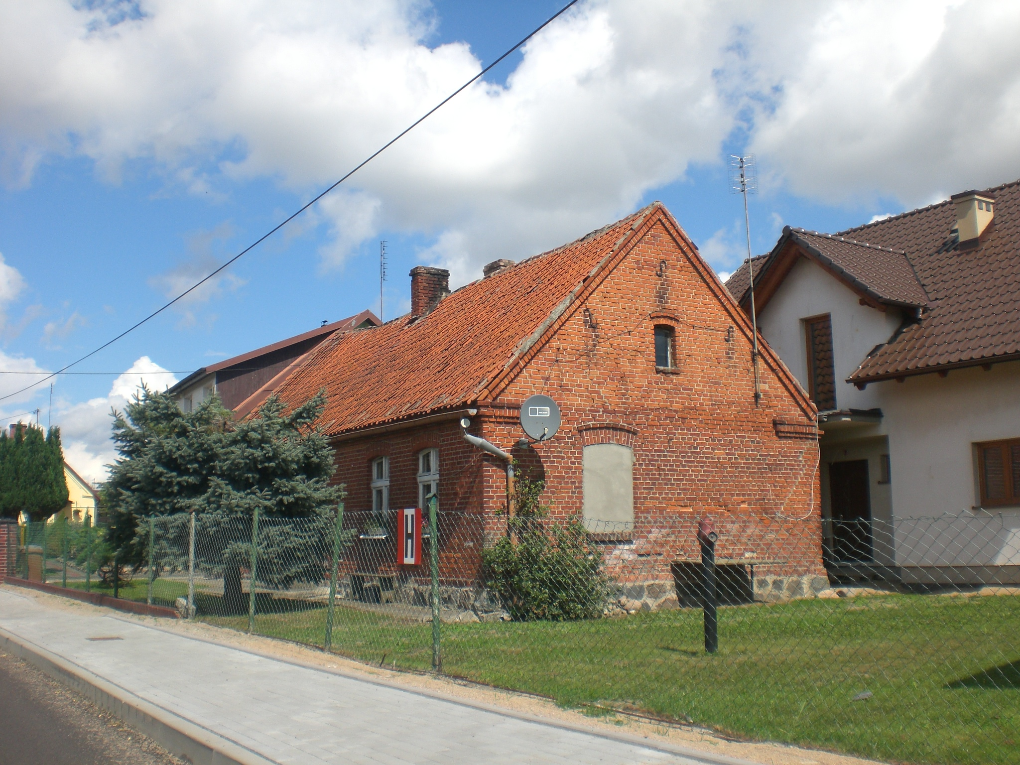 Więckowy